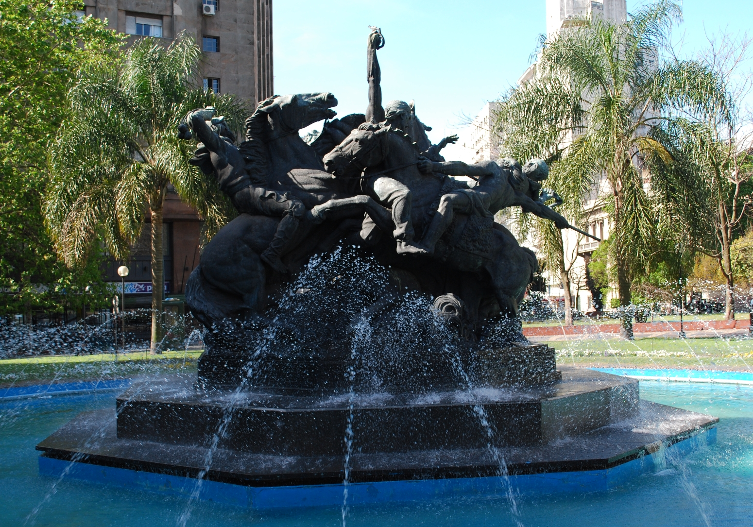 Fotografía de la escultura "El entrevero" del escultor uruguayo José Belloni (1882 - 1965), situada en la "Plaza del Entrevero" (Montevideo - Uruguay).